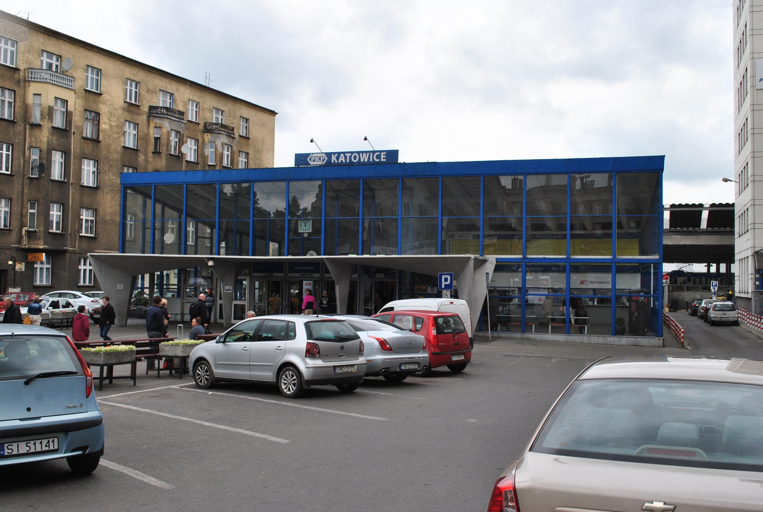 Katowice (stacja kolejowa) - Pawilon od strony placu Oddziałów Młodzieży Powstańczej